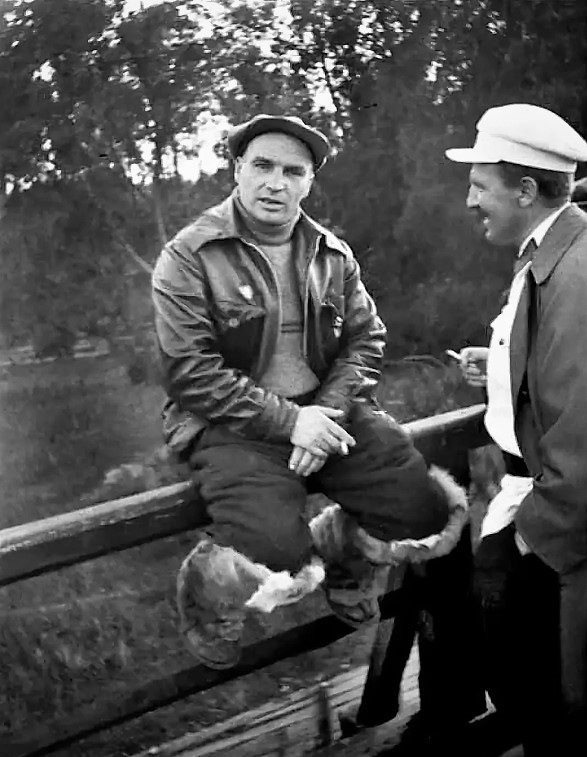 А. Н. Туполев (справа) и В. П. Чкалов обсуждают детали предстоящего перелёта на Дальний Восток